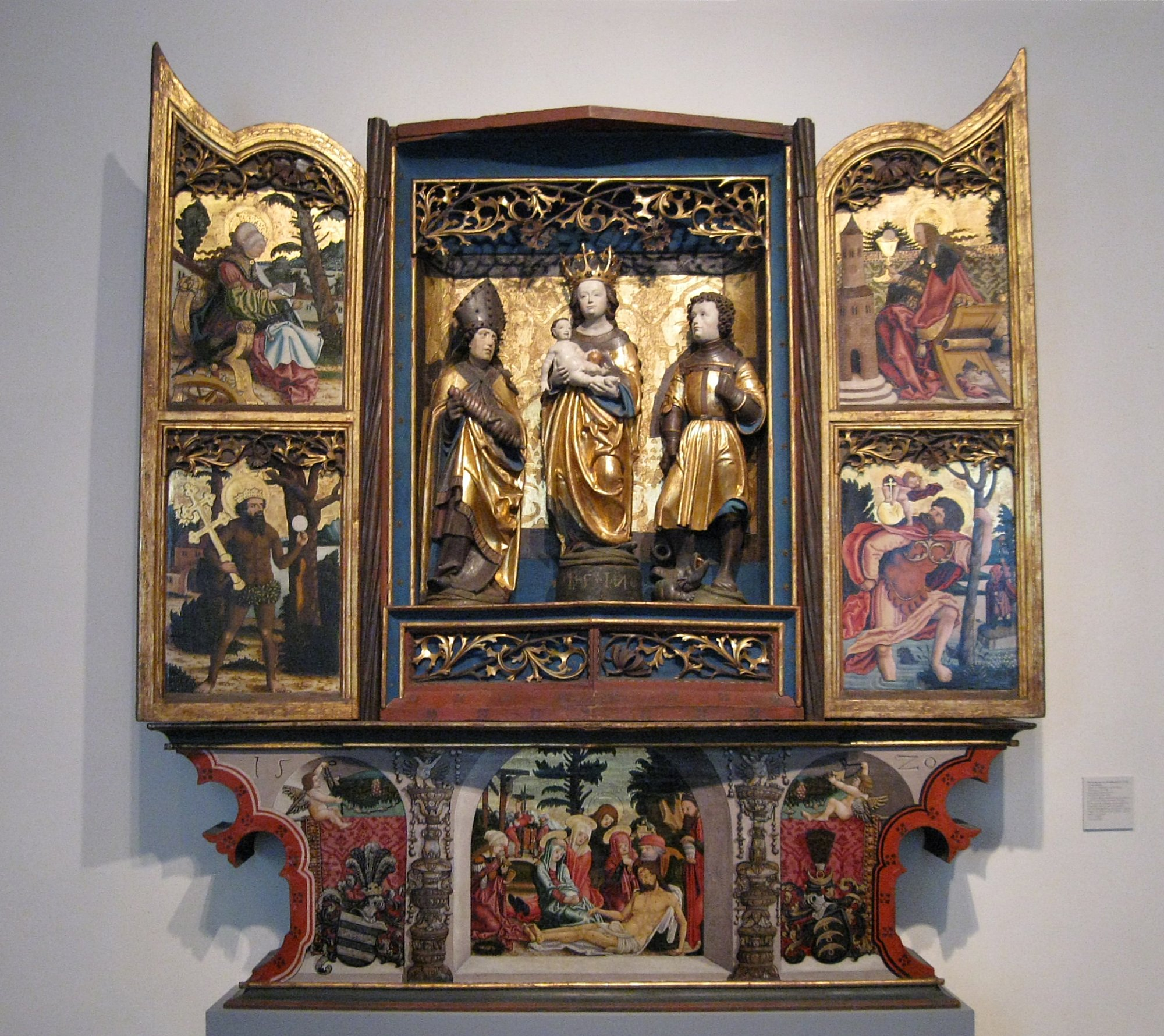 Meister von Rabenden: Marienaltar aus der Schlosskapelle St. Georg in Unterelkofen, um 1517-20, Bayerisches Nationalmuseum in München